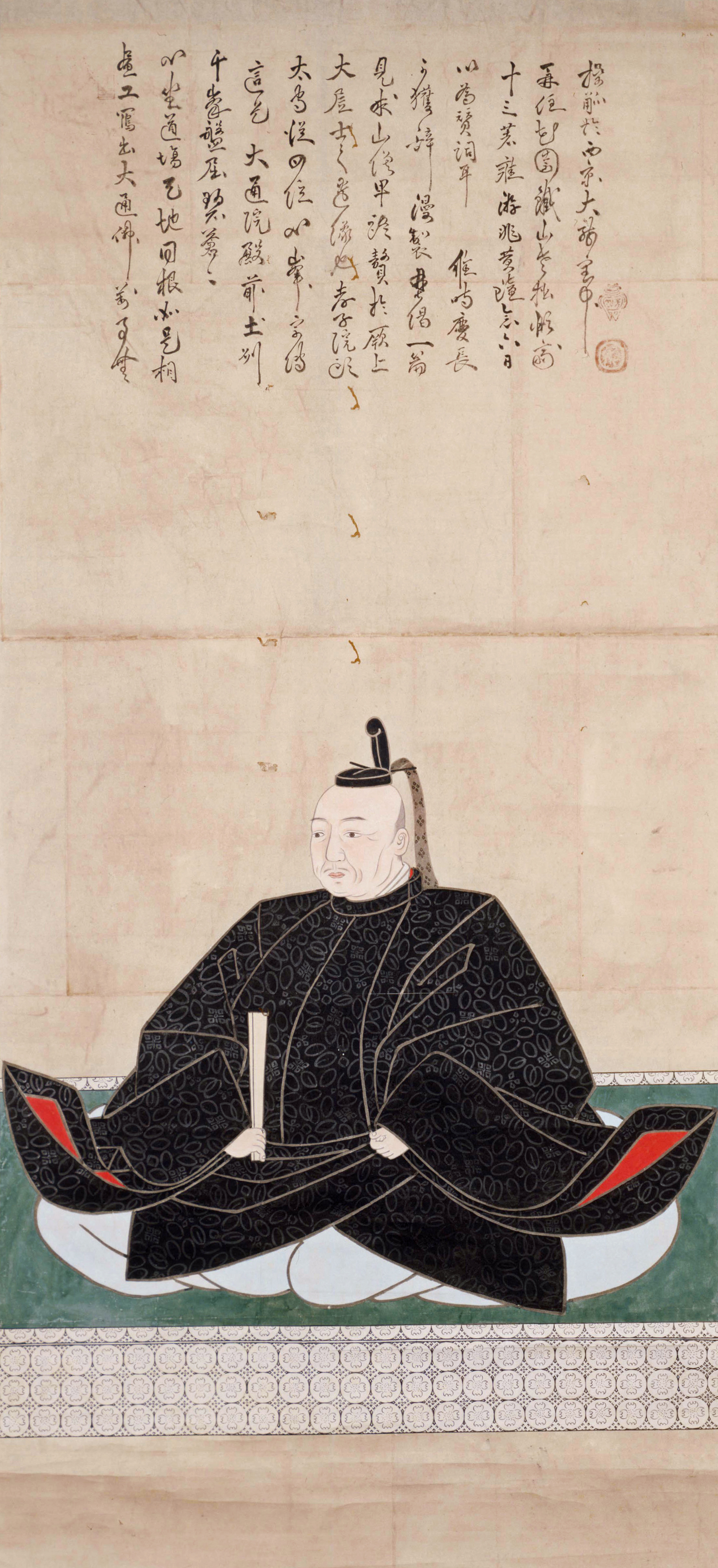 山内一豊像（鉄山宗鈍賛、原典は個人蔵・山内豊景氏）